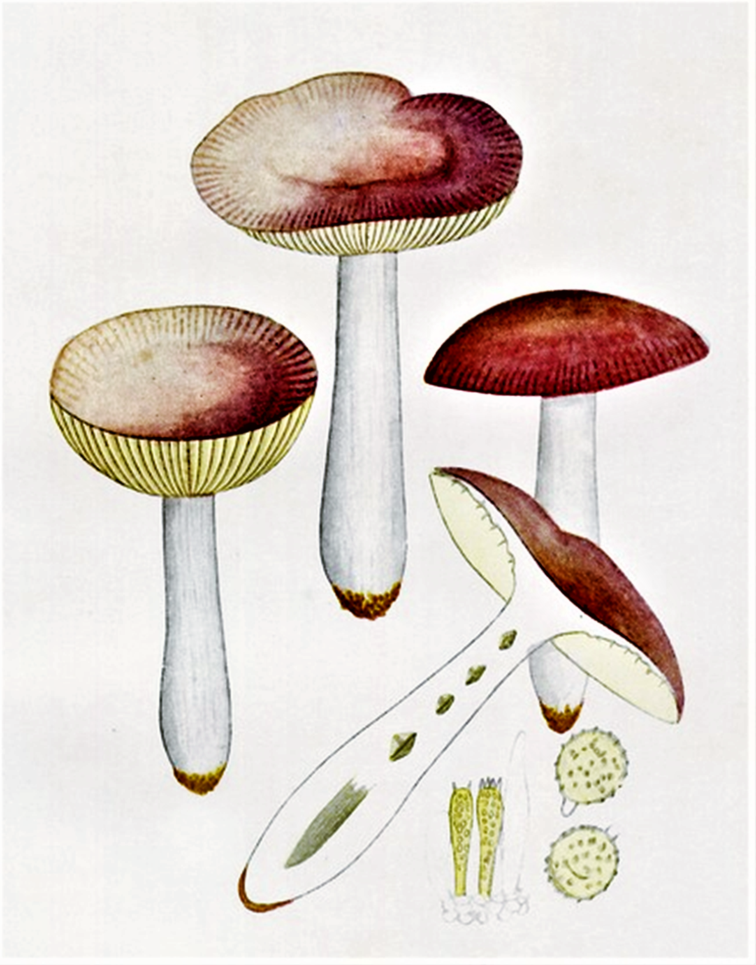 Giacomo Bresadola: Russula nauseosa (Pers., 1801) Fr. (1838)